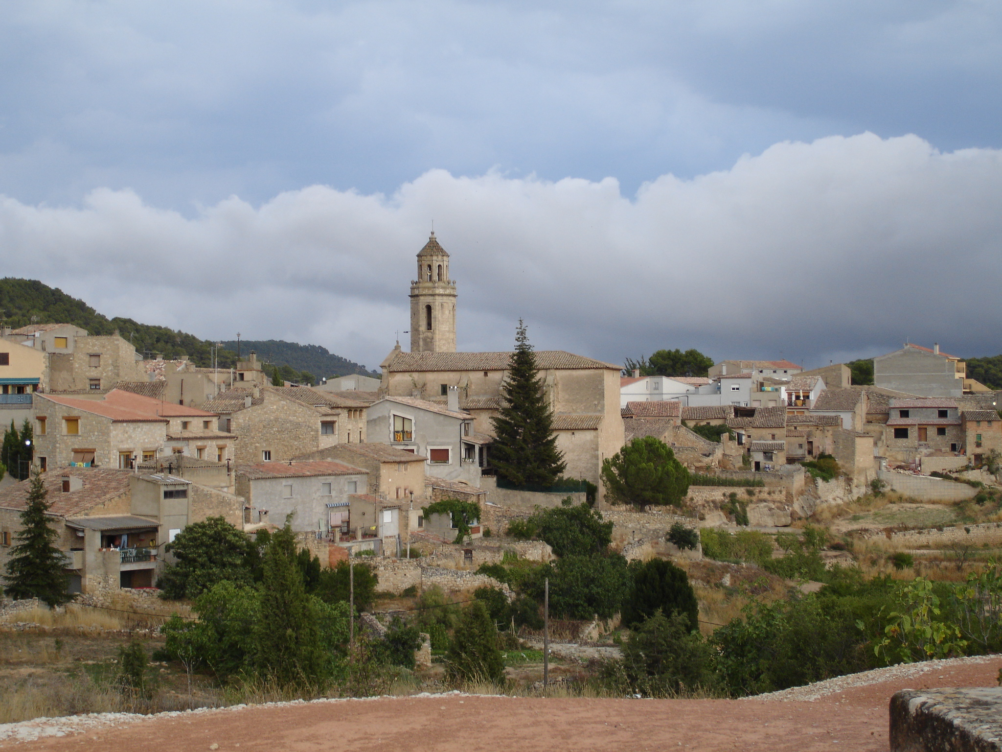 Església de Tarrés (Les Garrigues), Catalonia.